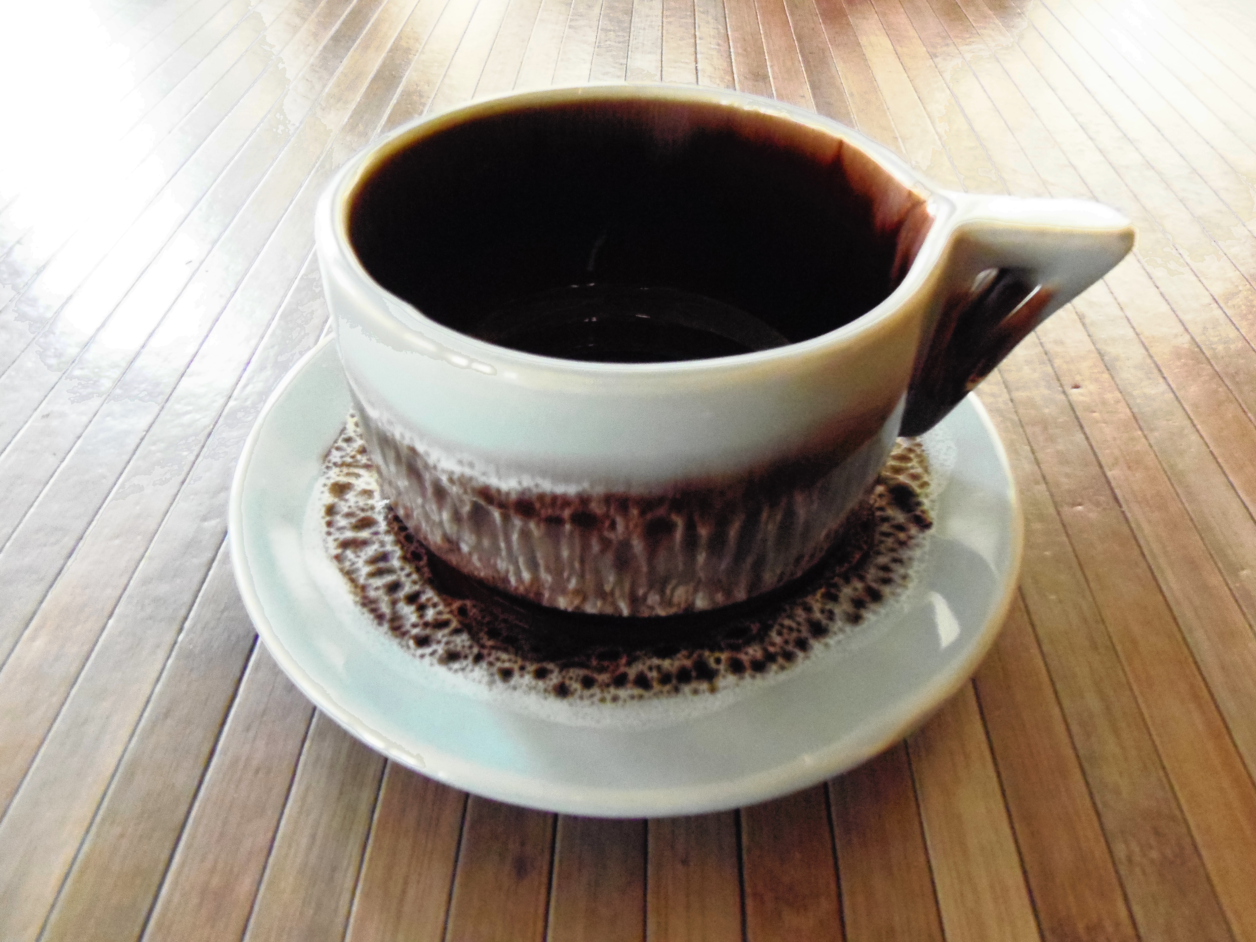 Déjeuner en céramique de Vallauris (circa 1967).